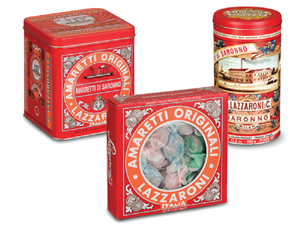 Foto pacchi